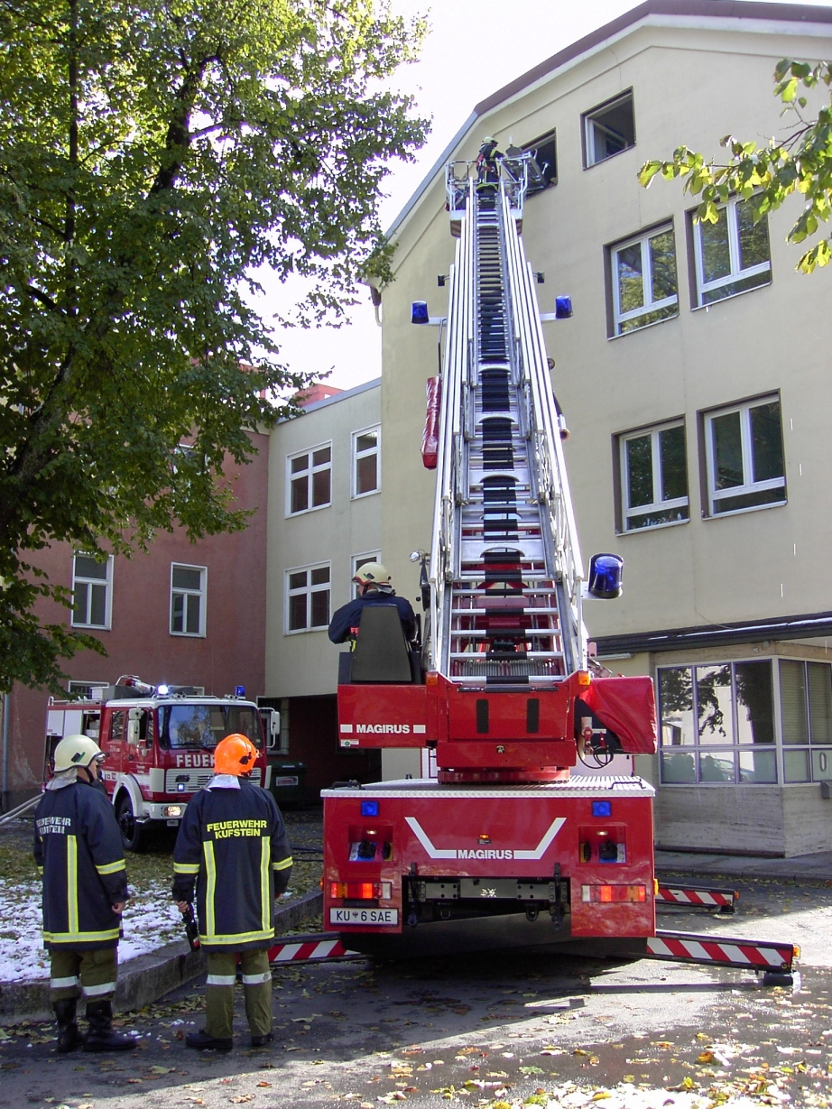 Die große Drehleiter der Freiwilligen Feuerwehr Kufstein/Tirol bei einer Übung im Oktober 2003